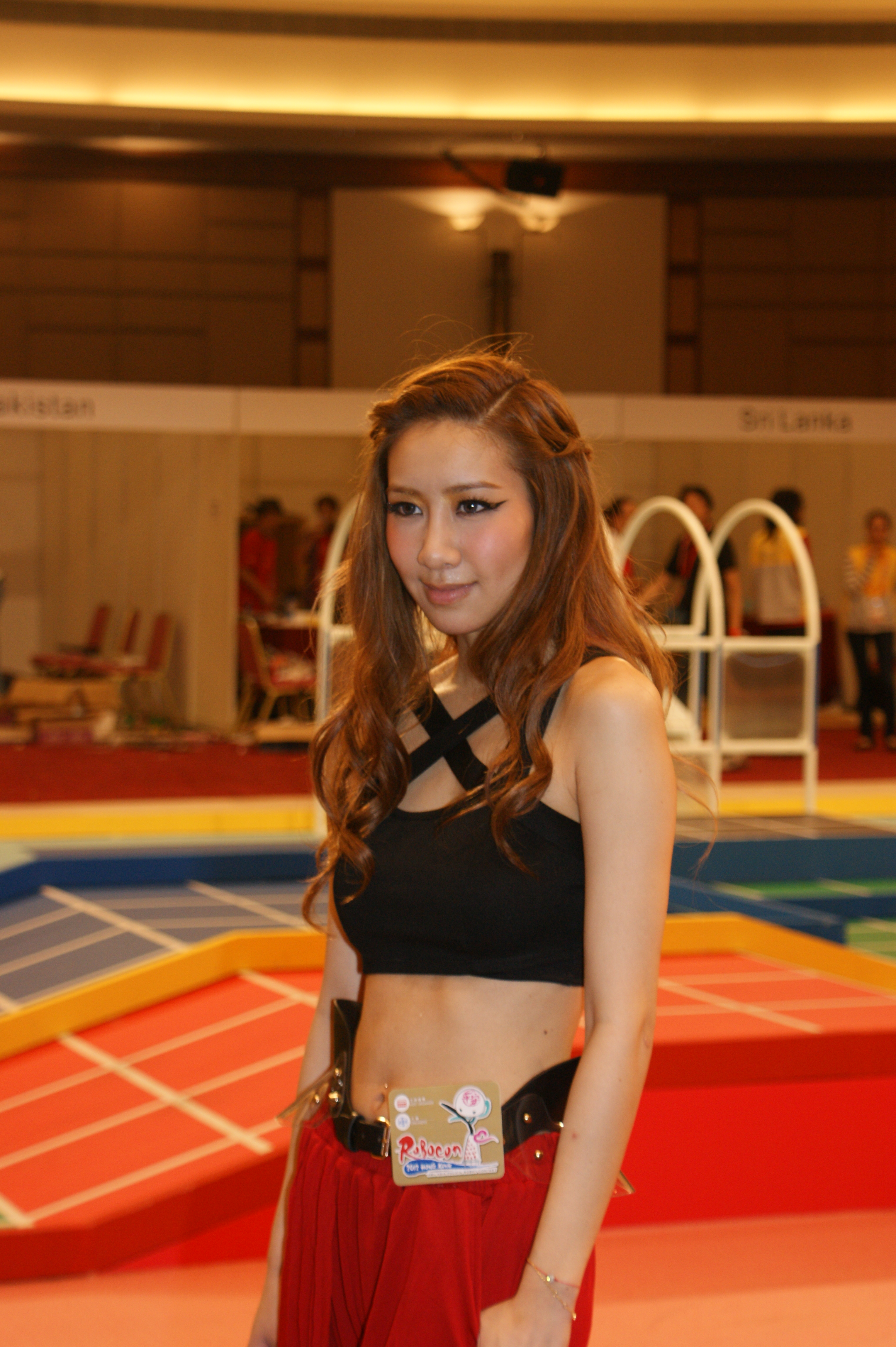 中文（香港）: Kary Ng 吳雨霏